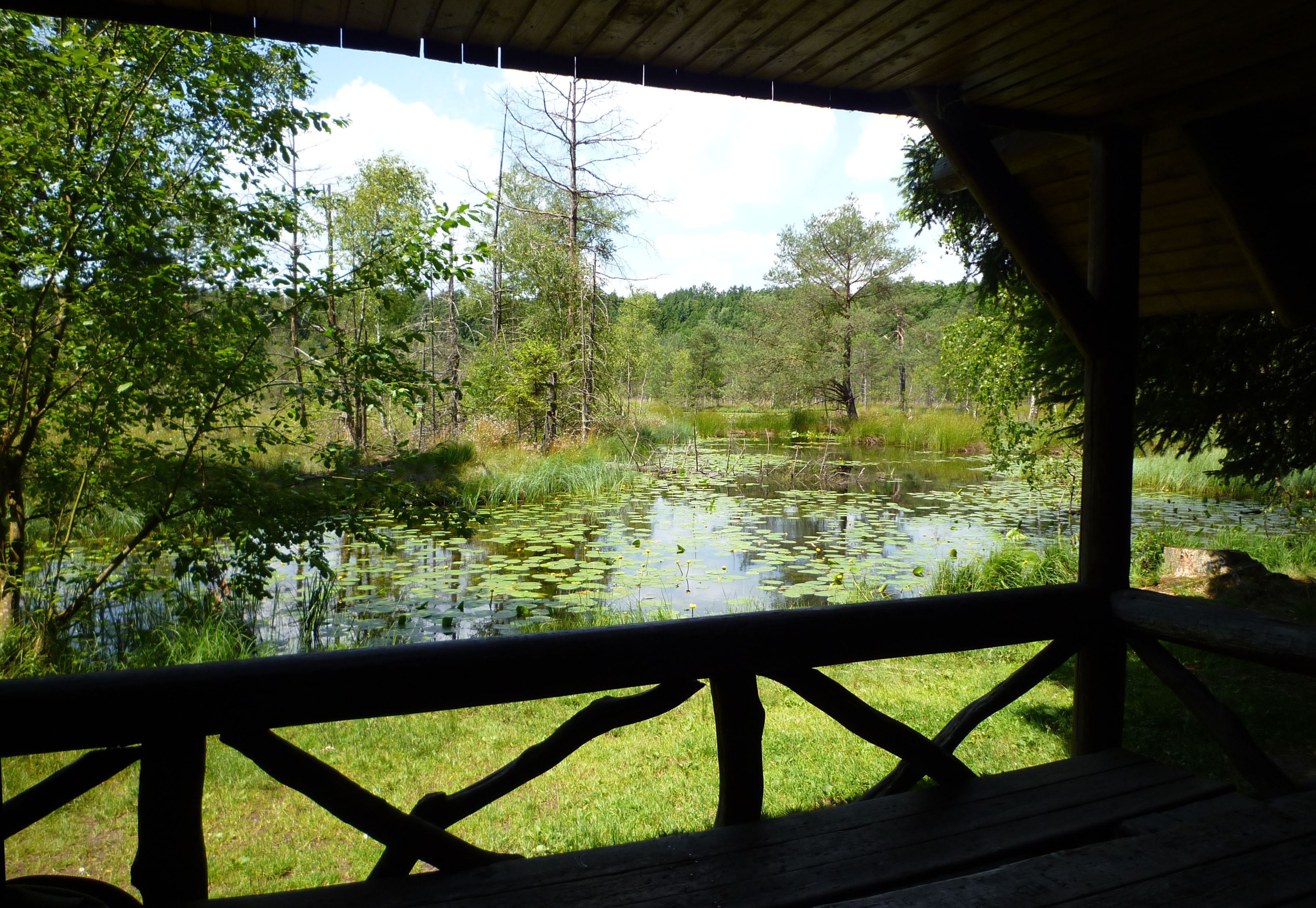 Blinder See bei Kanzach